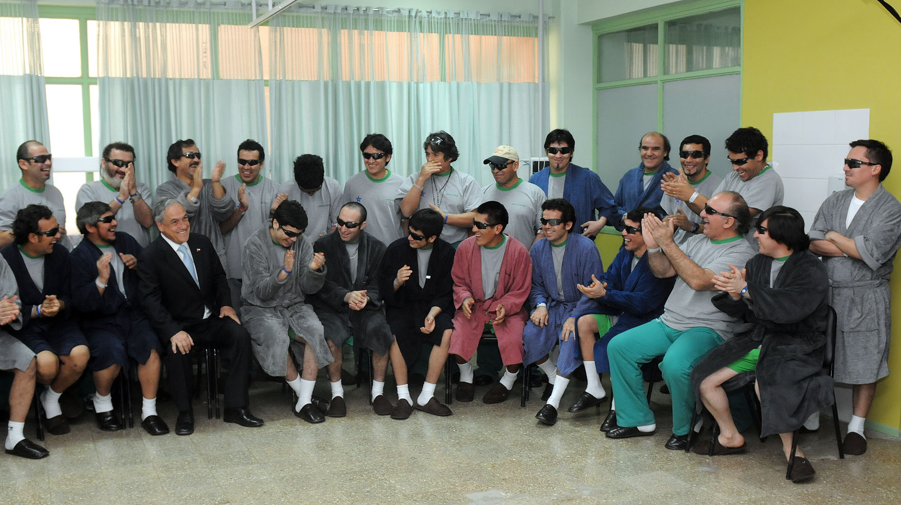 14.10.10 Visita del Presidente al Hospital de Copiapó